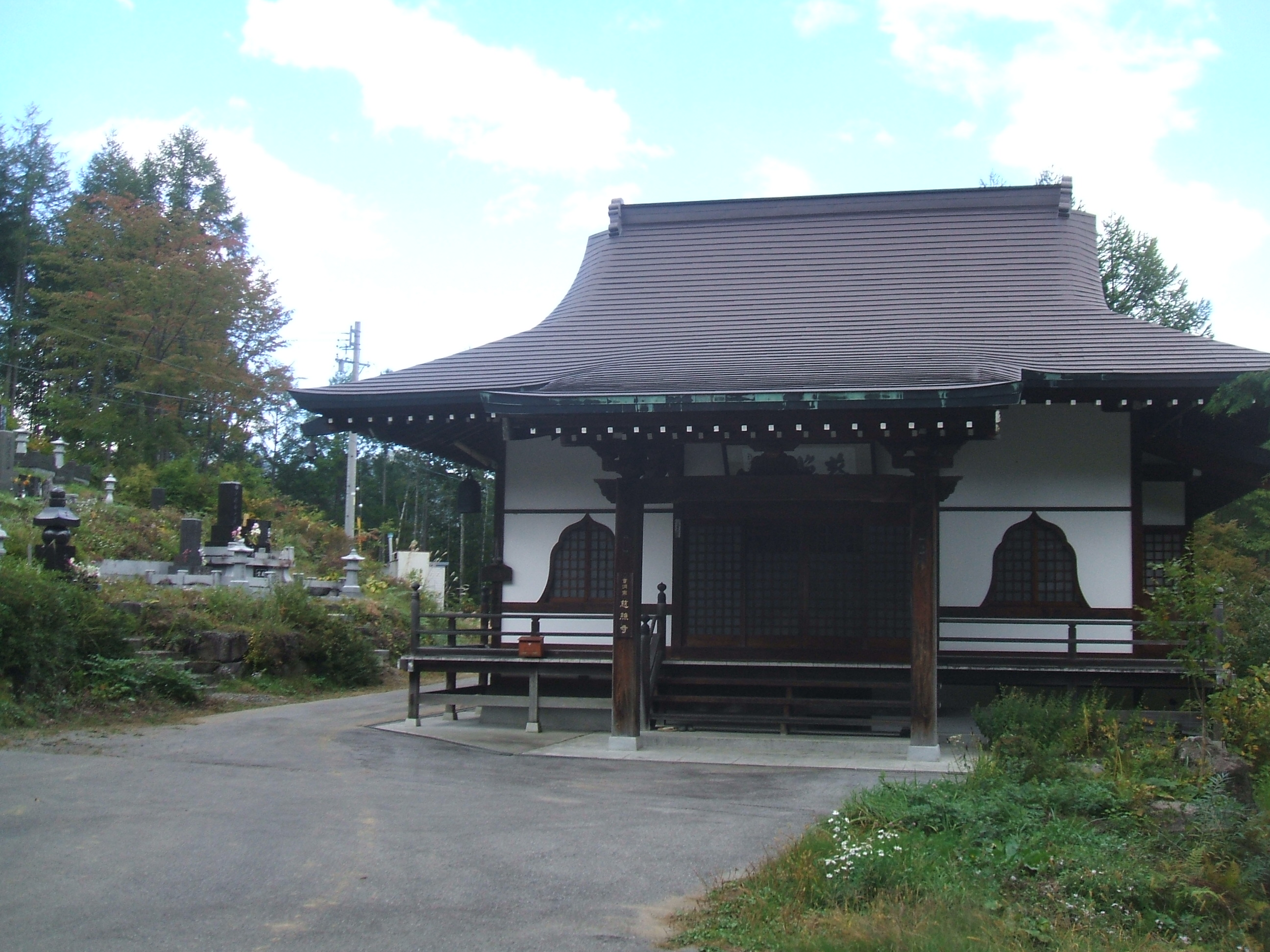 長野県松本市安曇大野川にある唯一の寺である慈照寺